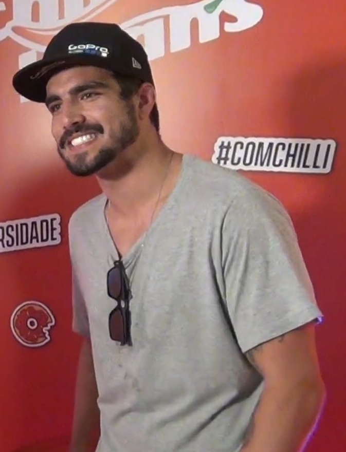 Caio Castro sendo entrevistado em abril de 2019.